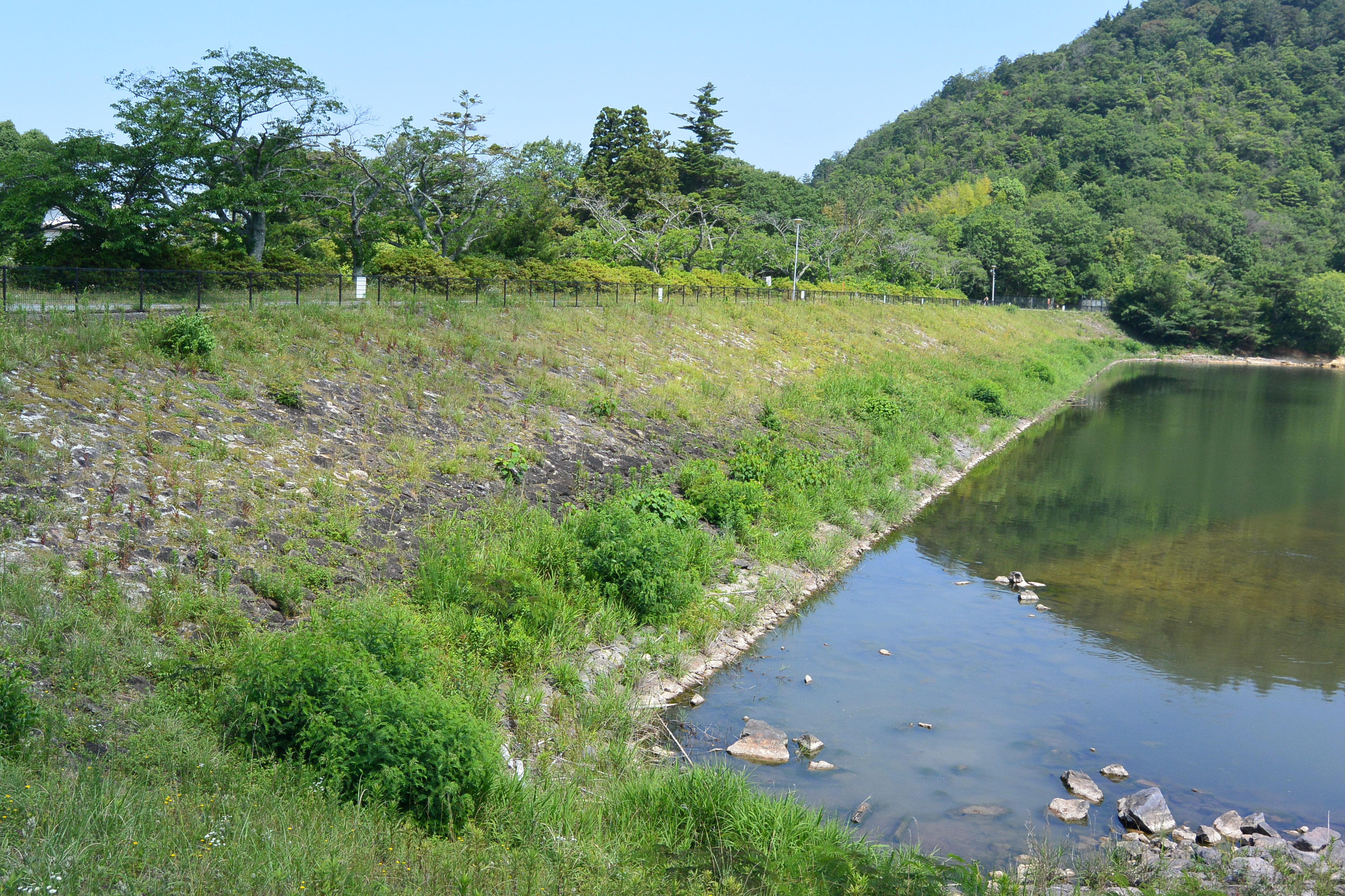 兵庫県西宮市の丸山第2ダム、第1ダムで堰き止めたダム湖の側面を形成している Nikon 1 AW1 + 1 Nikkor AW 11-27.5mm f/3.5-5.6